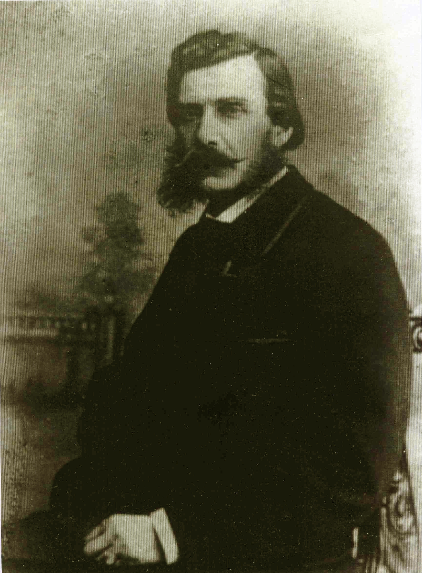 Файл наданий Затурцівським меморіальним музеєм В'ячеслава Липинського